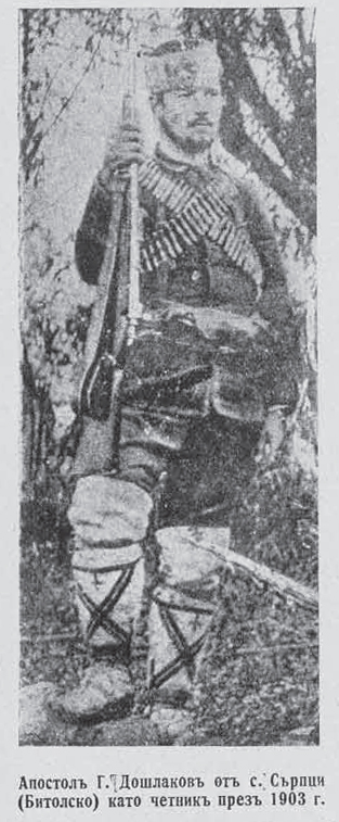 Apostol Doshlakov